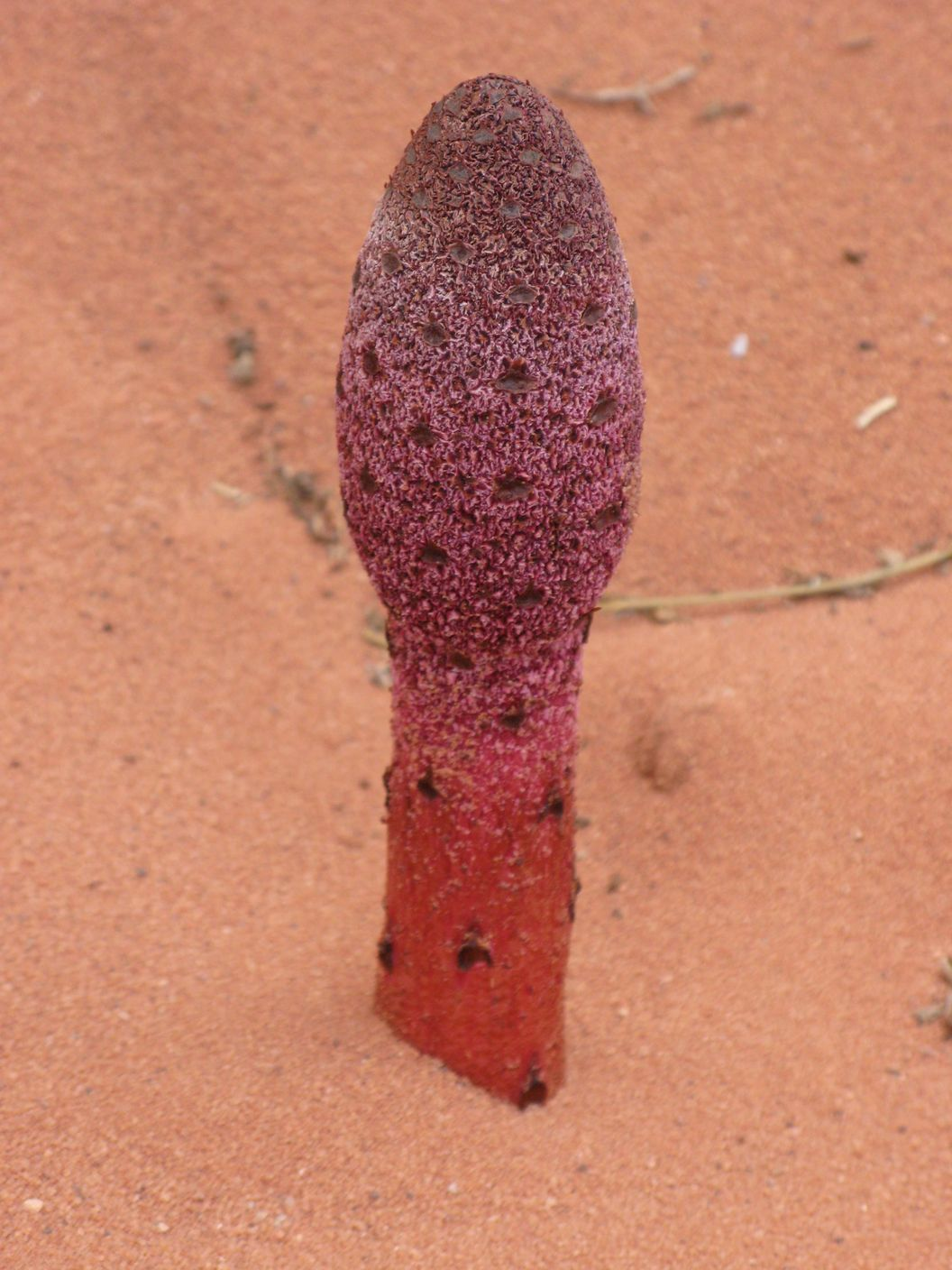 Cynomorium coccineum L.photographié dans le désert jordanien du Wadi Rum -sud Jordanie-.